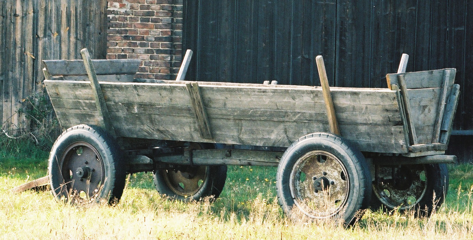 Fura - obiekt znajdował się na obszarze ziemi lublinieckiej